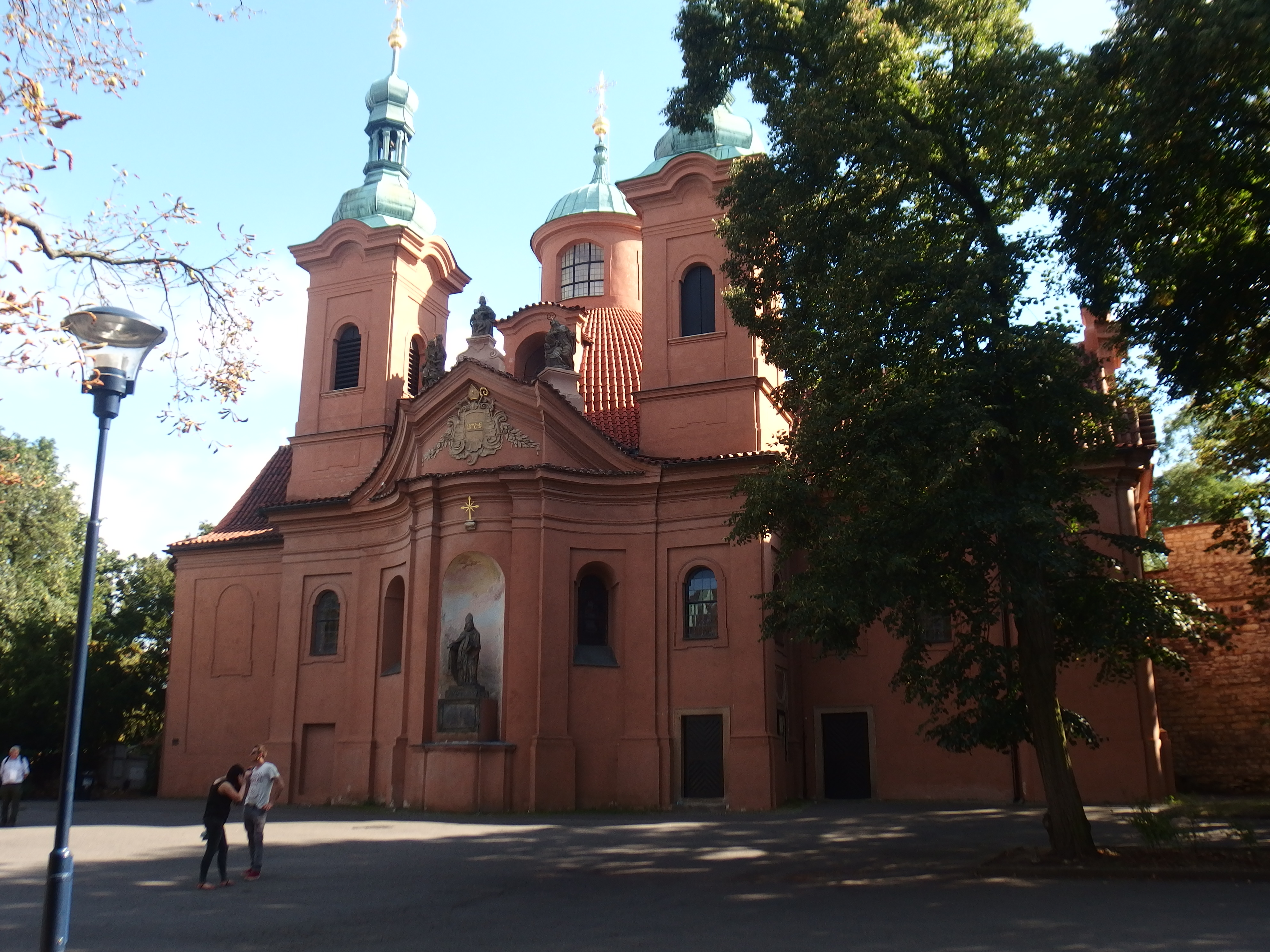 Kostel svatého Vavřince na Petříně, Petřínské sady čp. 342 a stavby bez čp., Praha 1, Malá Strana.